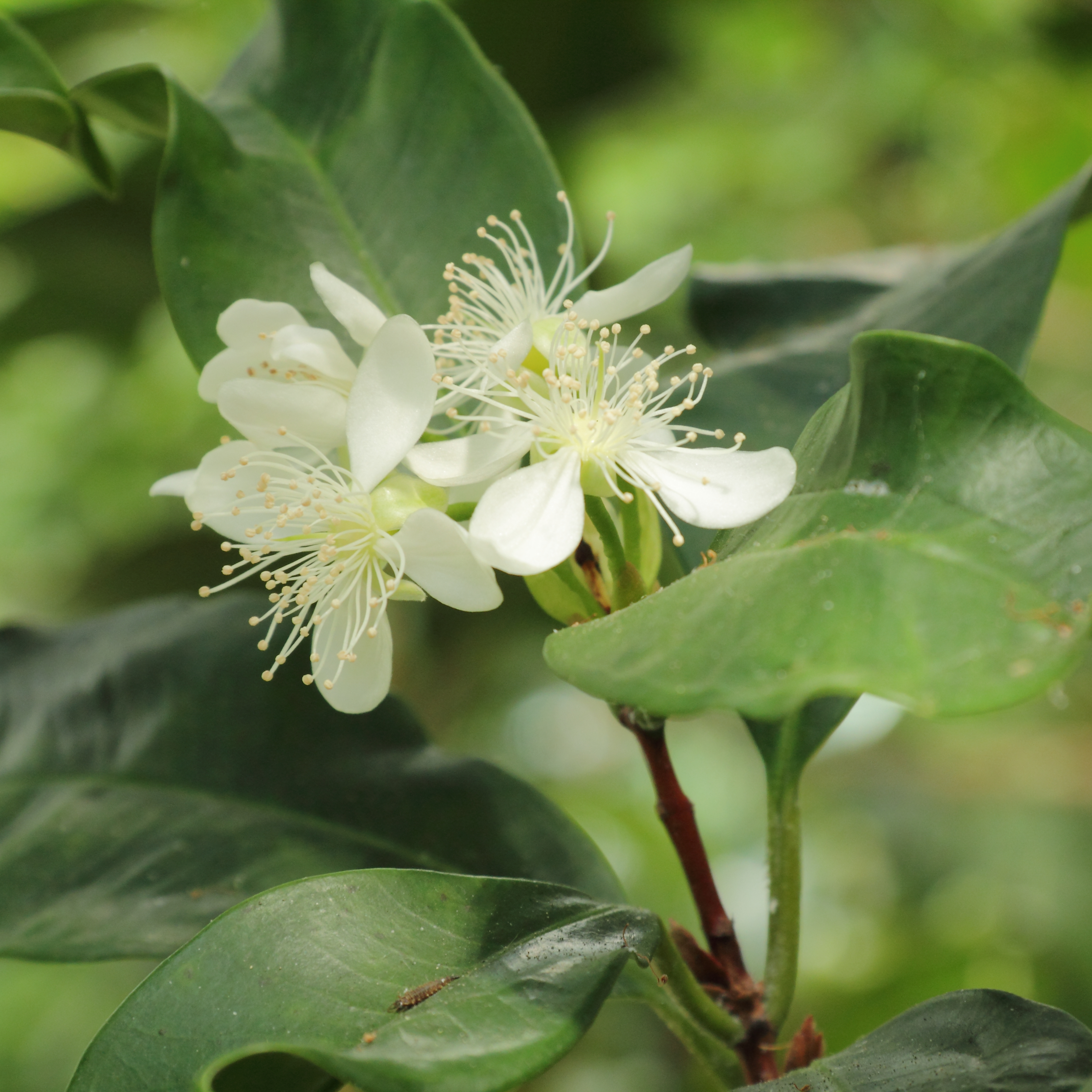 Pimenta dioica , identifierad med hjälp av befintlig skylt vid Bergianska trädgården.